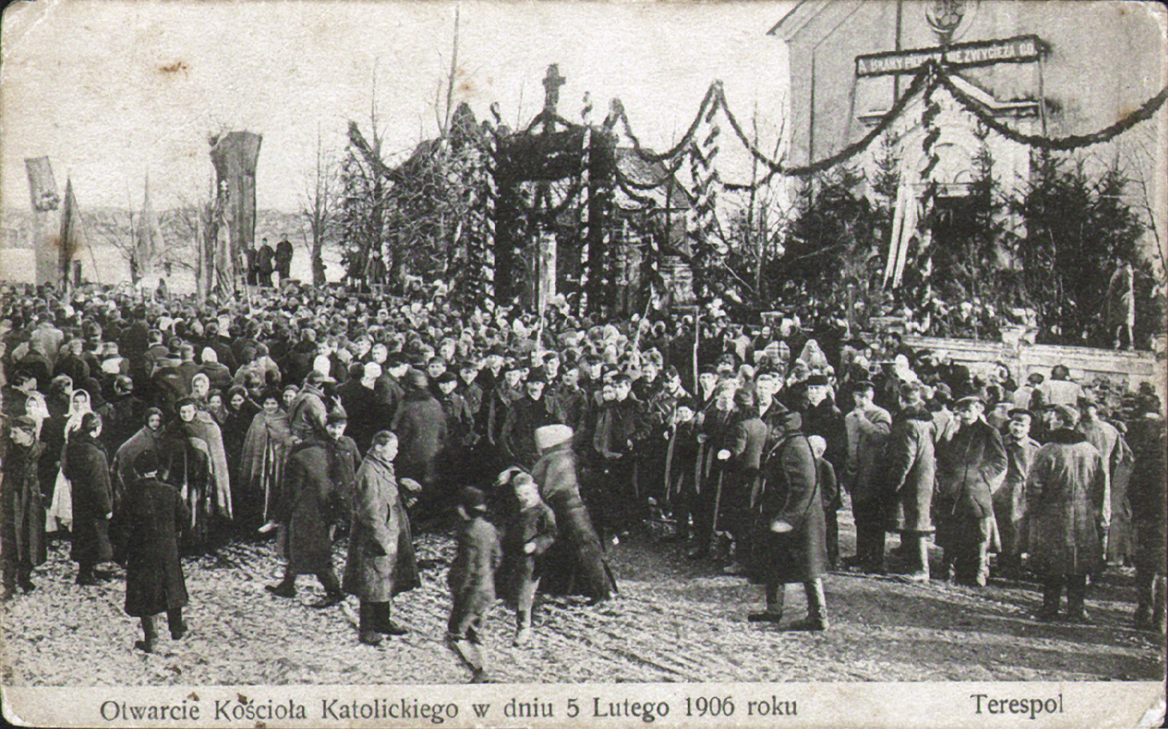 Беларуская (тарашкевіца): Тэрэспаль (Terespal). Траецкі касьцёл